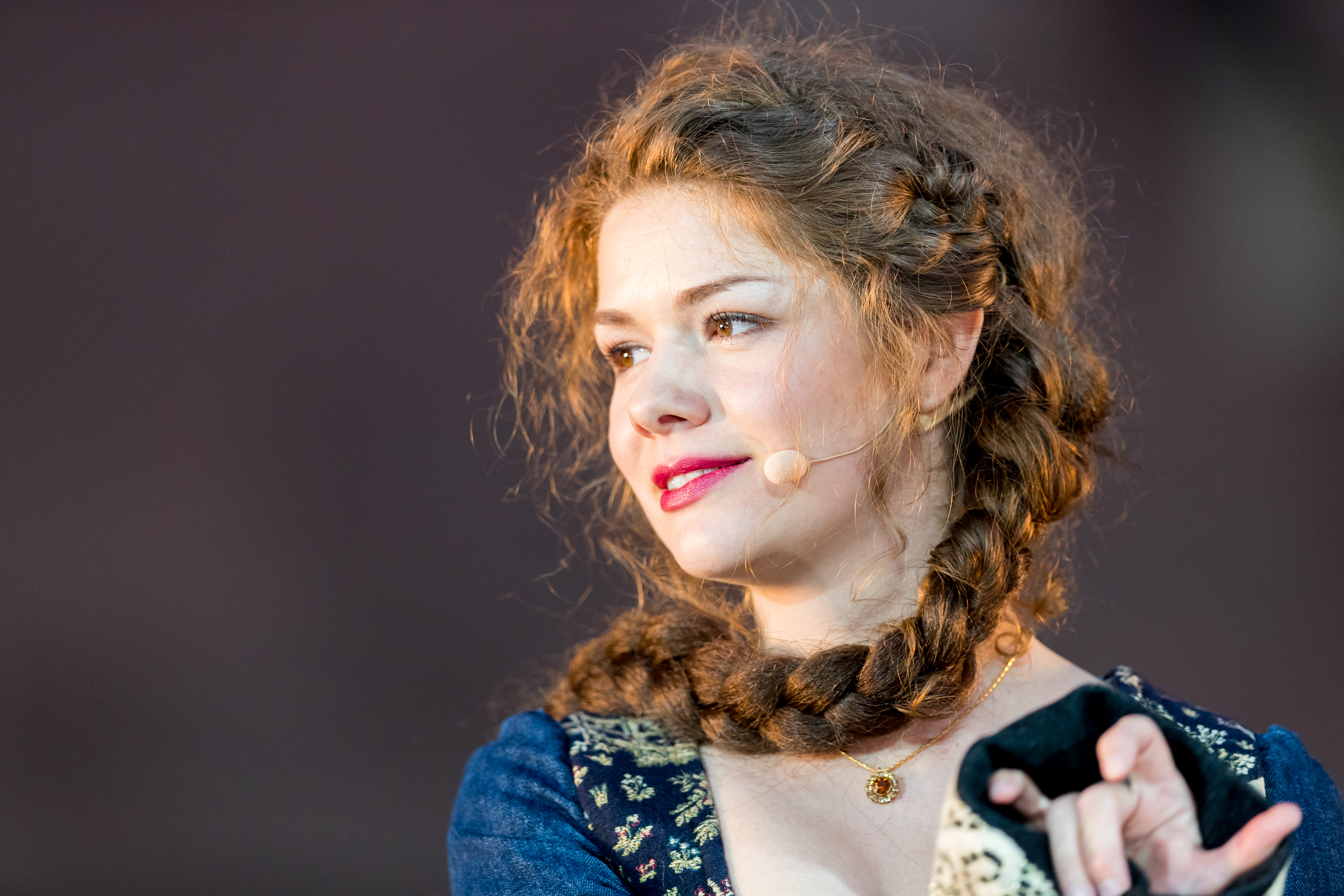 Linn Reusse during Nibelungenfestspiele "Siegfrieds Erben" at Wormser Dom, Worms, Rheinland-Pfalz, Germany on 2018-07-19, Photo: Sven Mandel